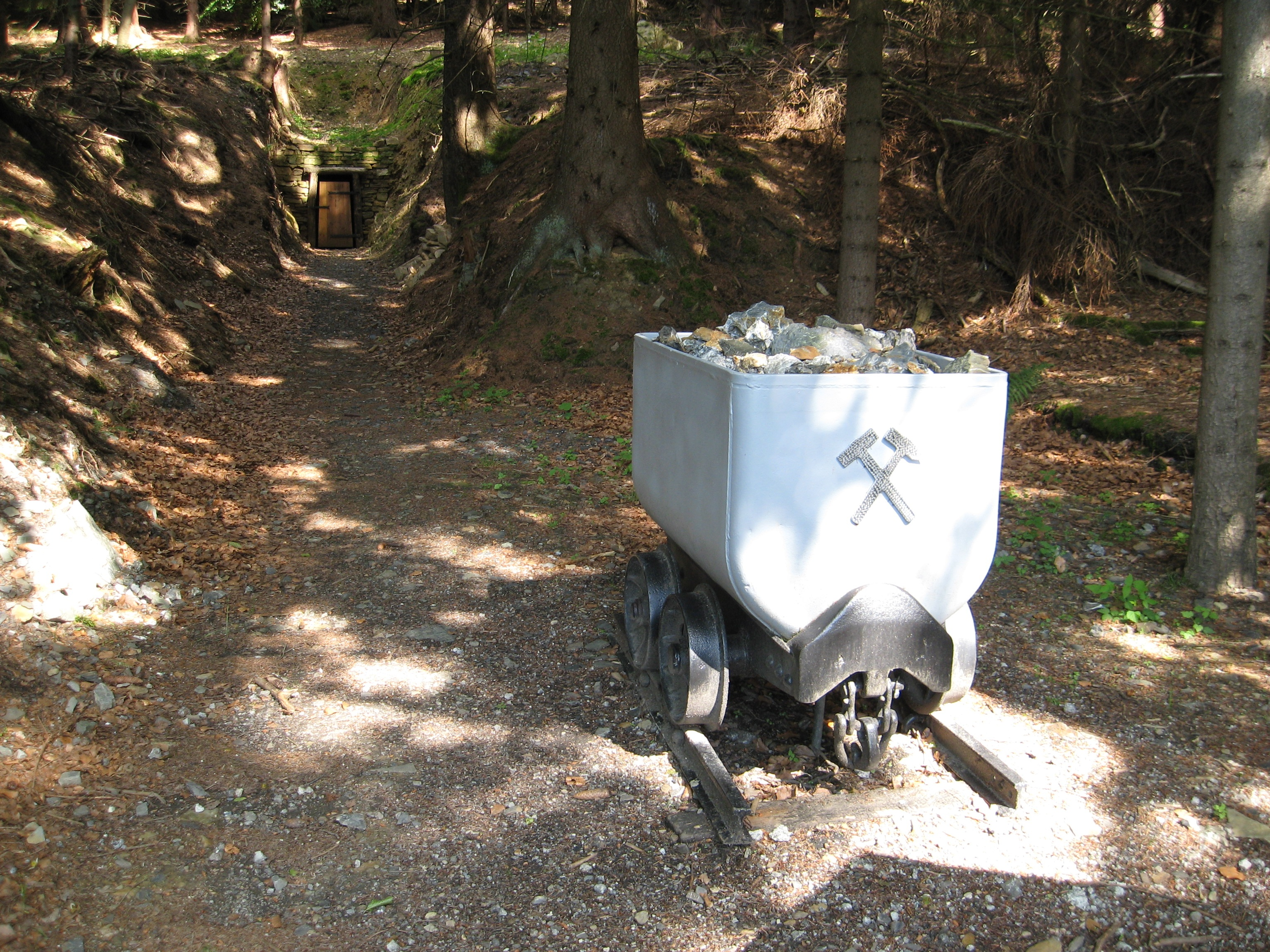 Hunt vor dem Stolleneingang der Grube Marie, Wilnsdorf, NRW (DE).